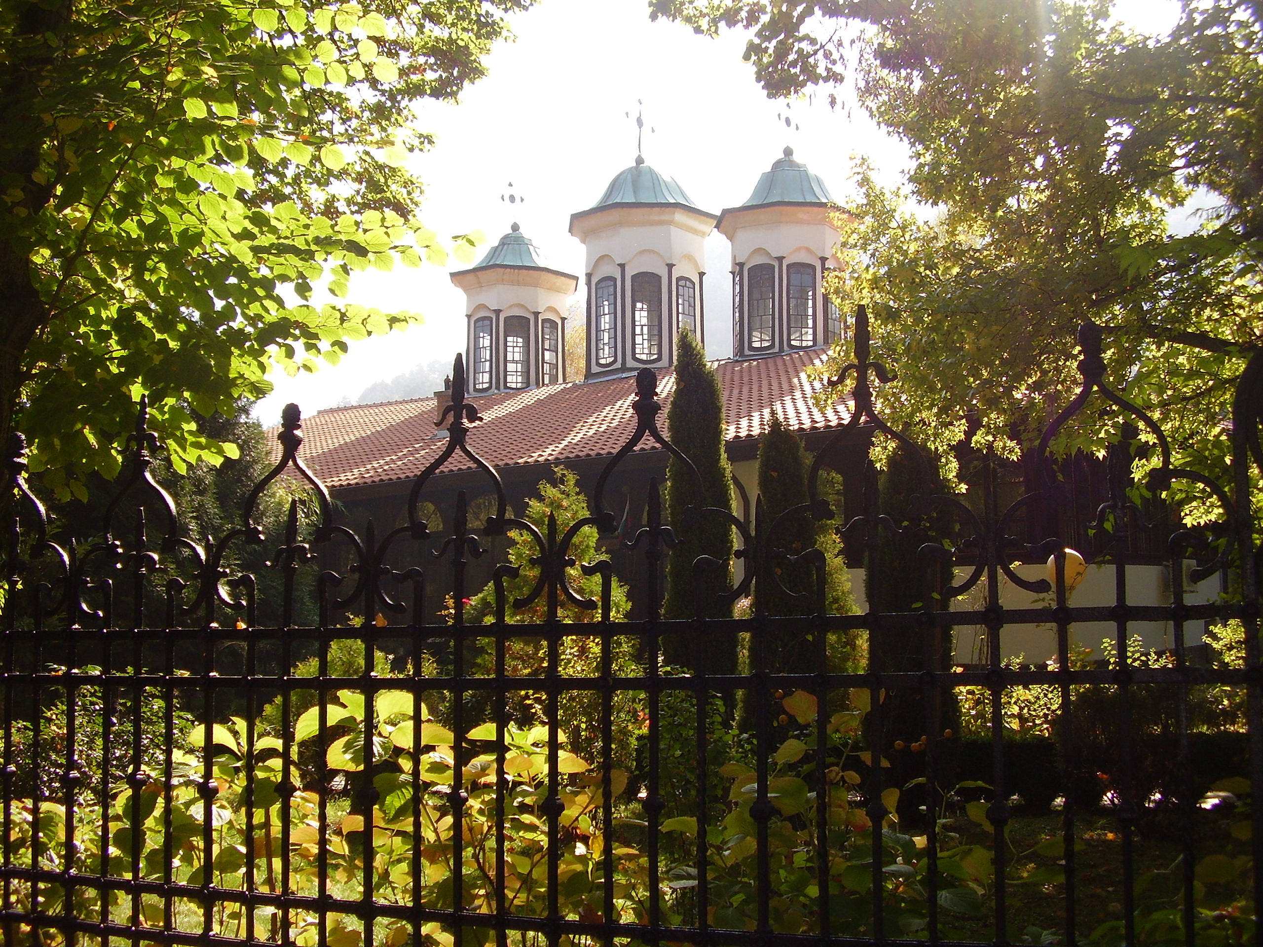 Църквата "Успение Богородично" - Кюстендил